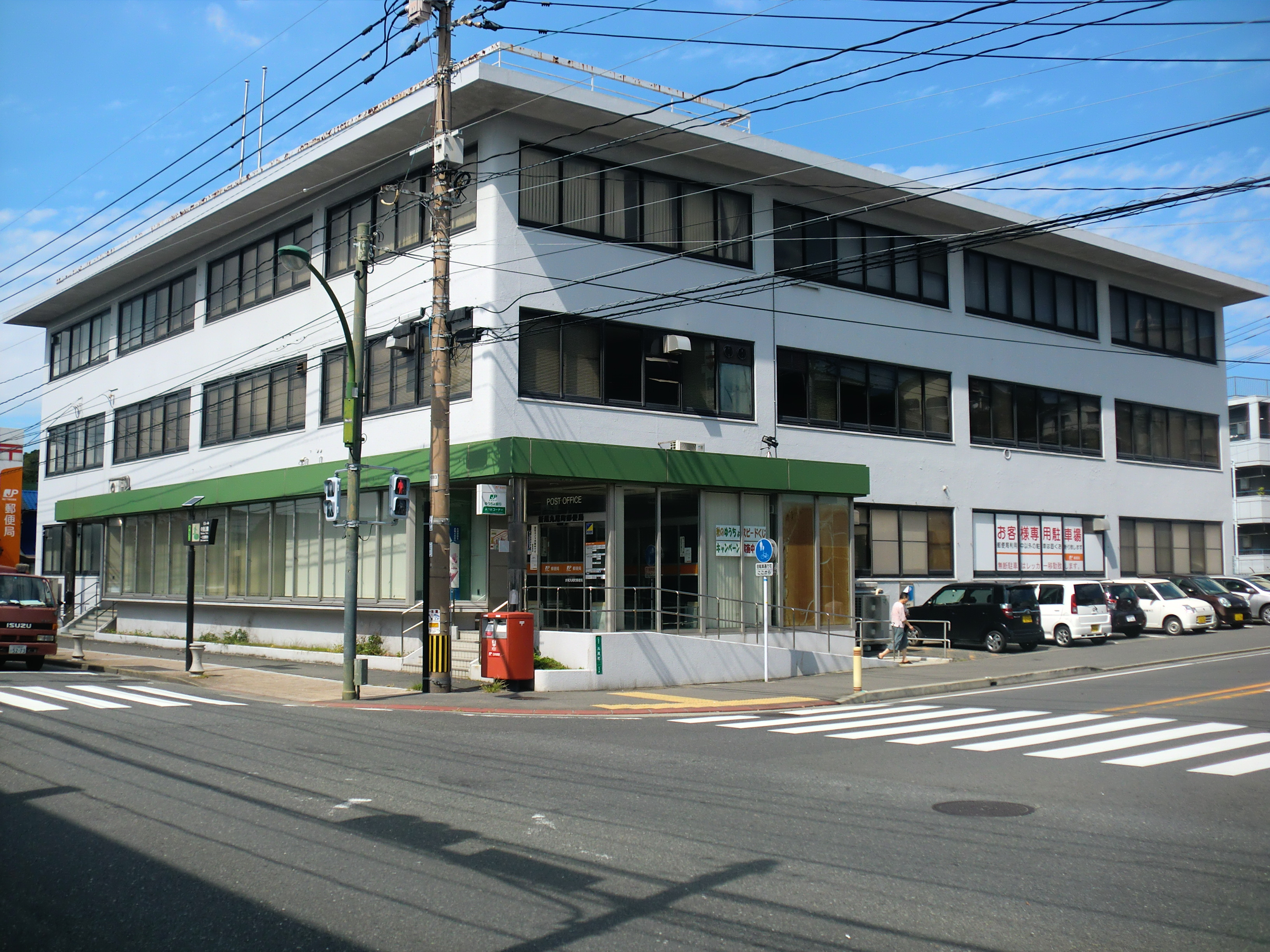 北九州市八幡西区にある折尾丸尾町（おりおまるおまち）郵便局